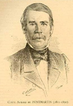 Armand de Pontmartin (1811-1890)